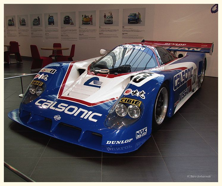 NISSAN R89C historic racing car of 1989